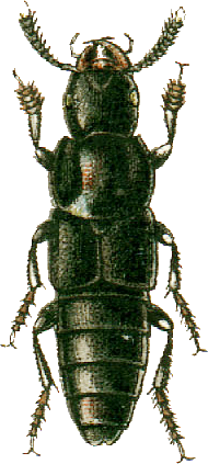 This file has been extracted from another file: Jacobs14.jpg